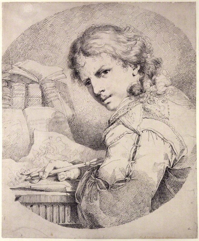 Self-portrait